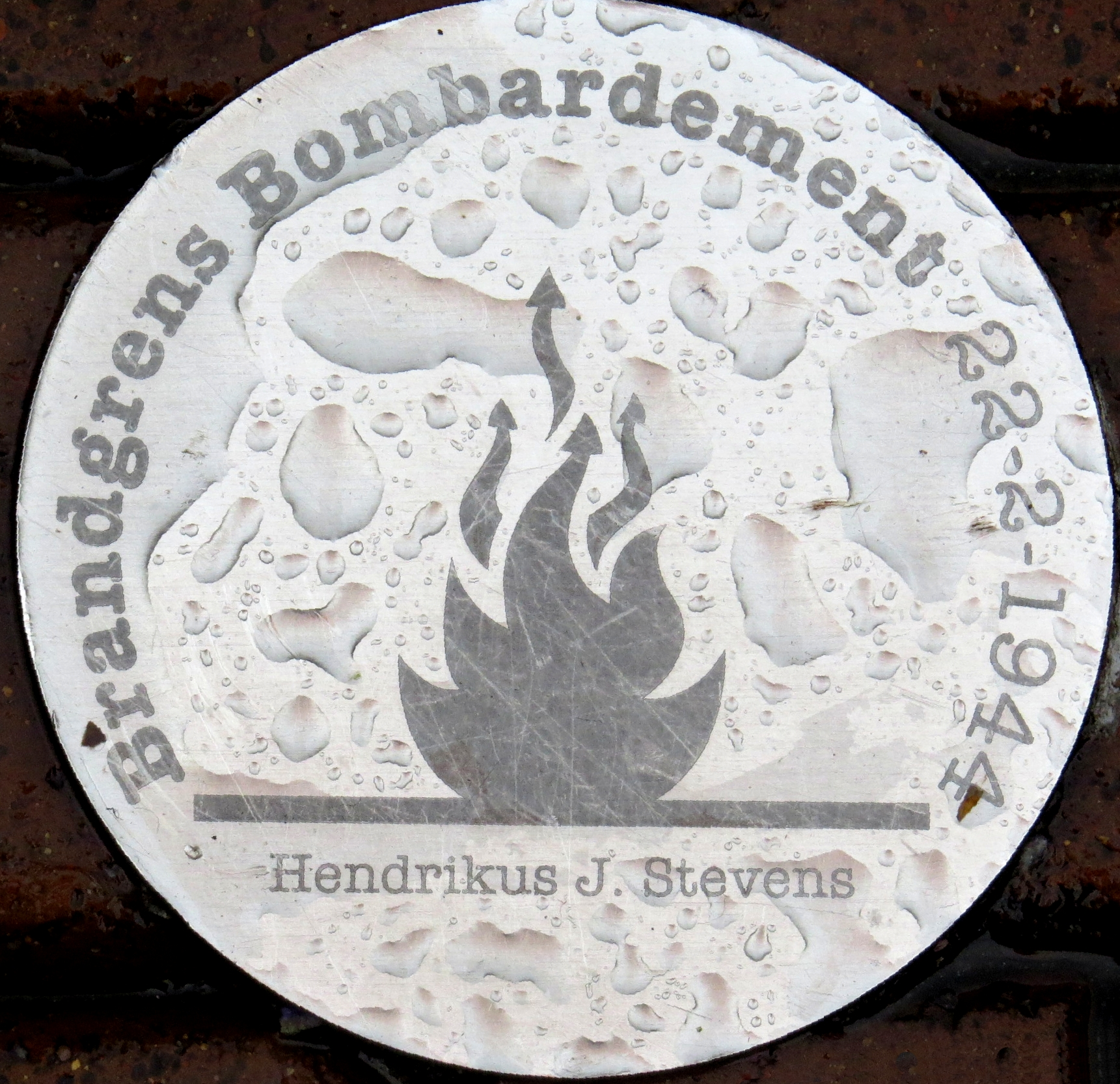 Nijmegen, Bodenmarkierung der Brandgrenze vom Bombardement am 22. Februar 1944